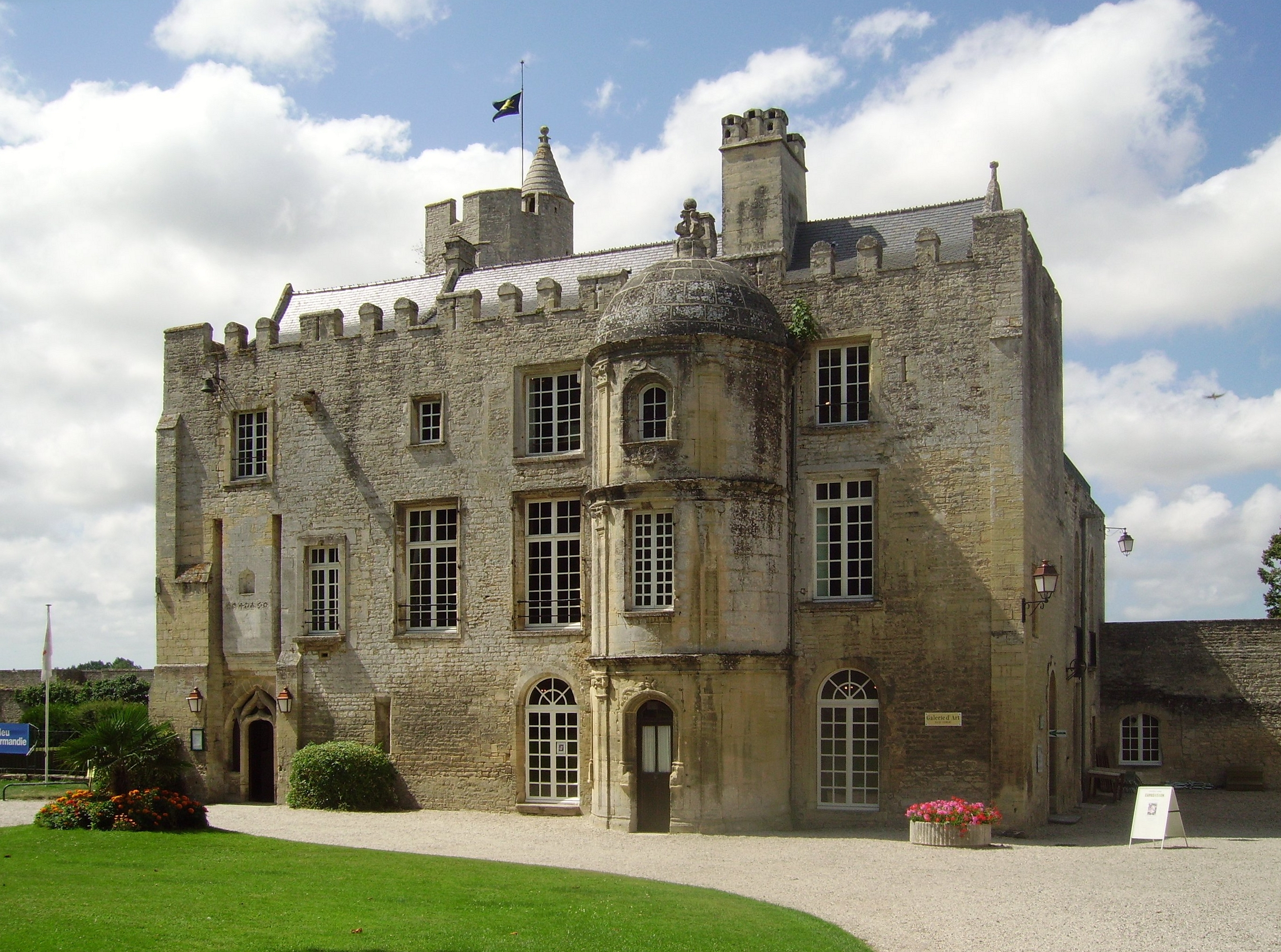 Chateau de Creully